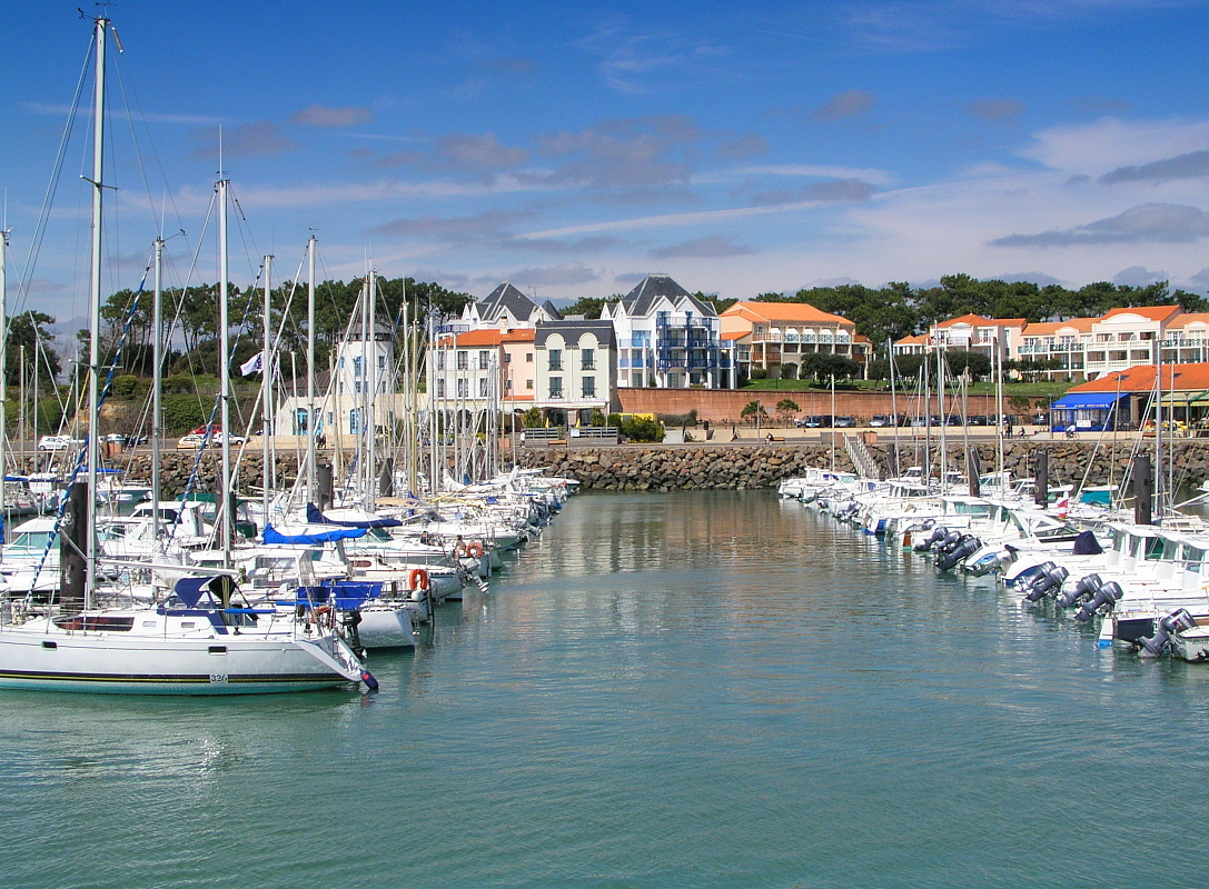 Bourgenay, Talmont, France